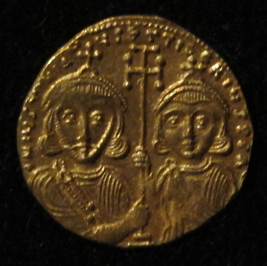 Monete d'oro di giustiniano II e tiberio IV, 705-711, 02, 1